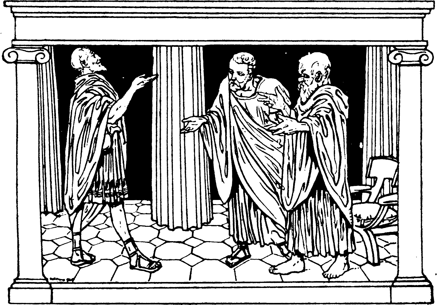 Illustration from File:PL Platon - Hippjasz mniejszy.pdf